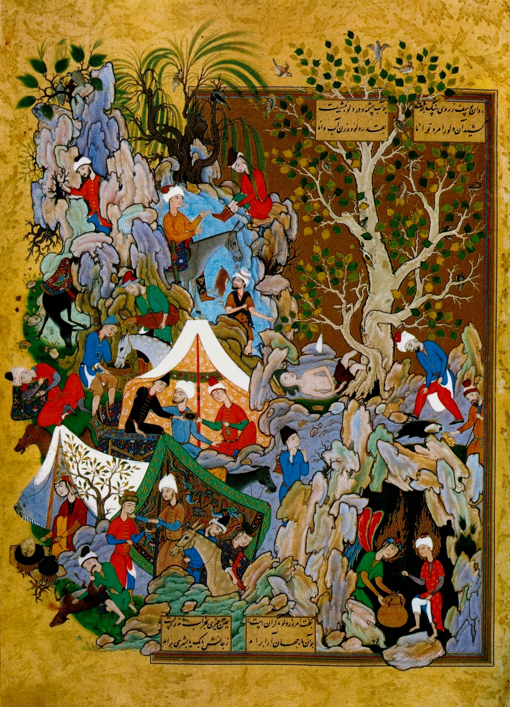 Музаффар Али. Хафт ауранг Джами Freer gallery of Art; Haft Aurang of Jami